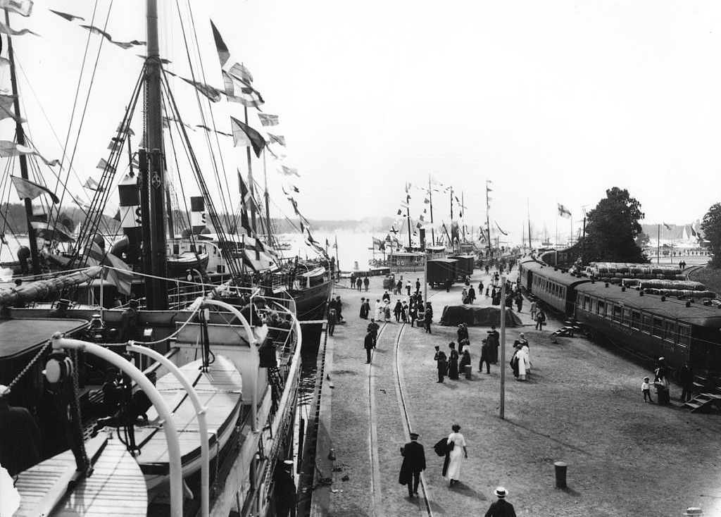 Vy över Nynäshamns hamn vid Gotlandskajen i samband med de kappseglingarna vid Olympiska spelen, juli 1912.